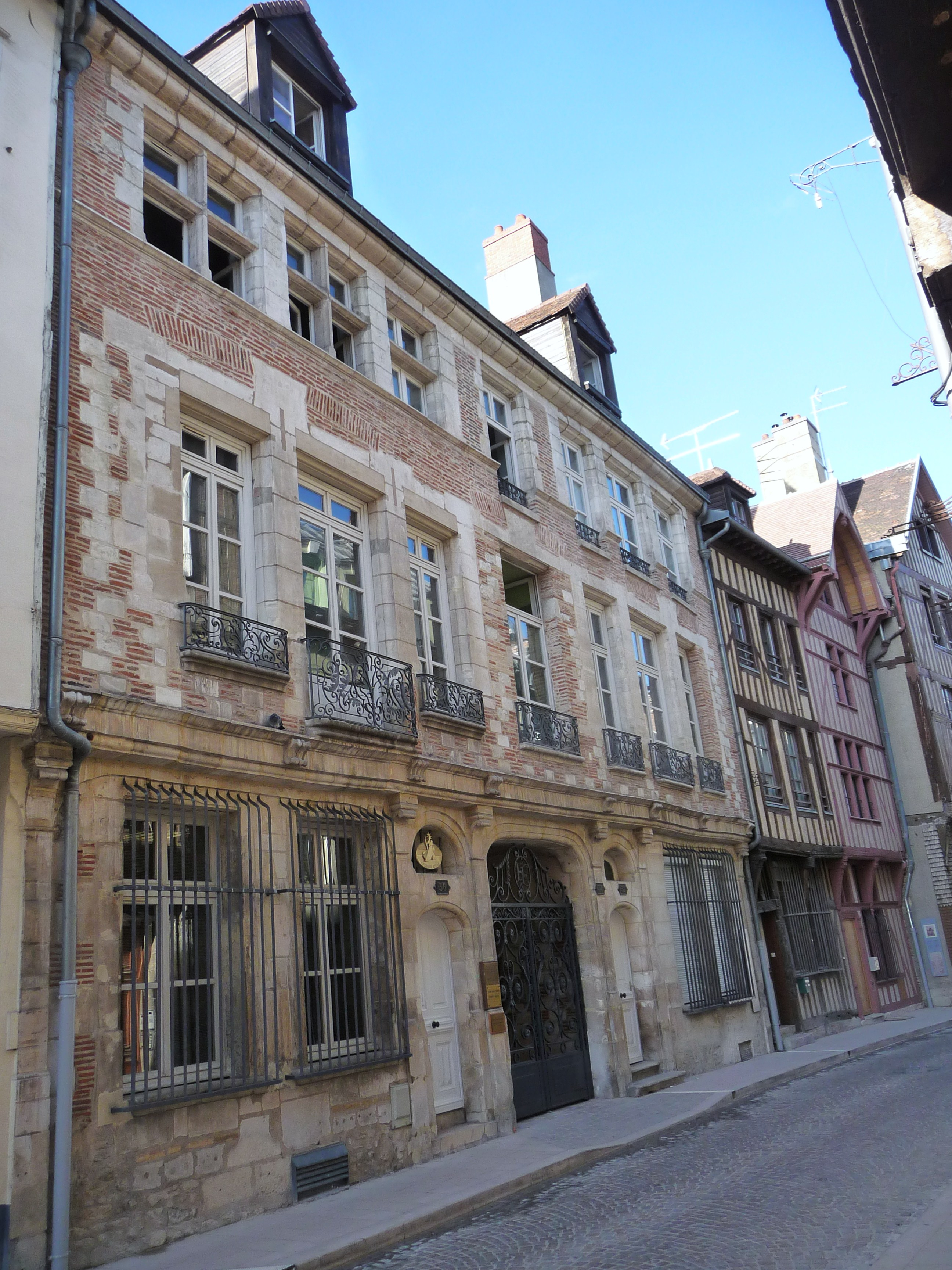 Façade de style Renaissance (1545) .